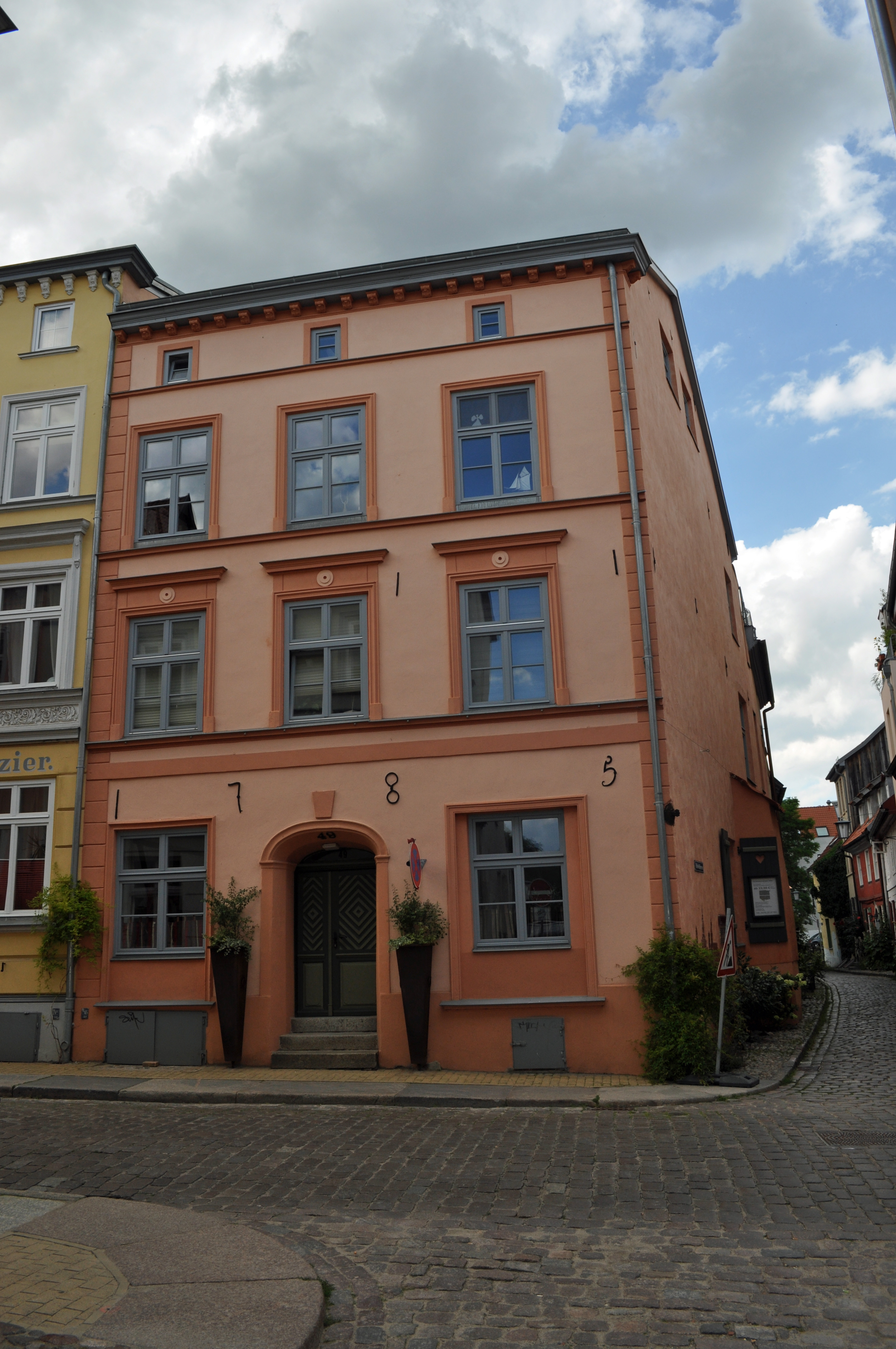 Das Foto zeigt ein Haus (bzw. Details des Hauses) in der Frankenstraße in Stralsund, Deutschland. Die Hausnummer steht im Dateinamen. Aufgenommen am 19. Juli 2011 vom Benutzer:Klugschnacker.